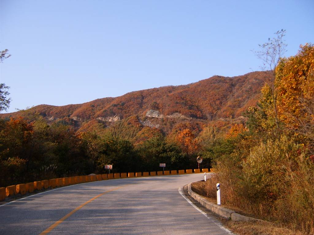 Dolsan-Ryung in fall